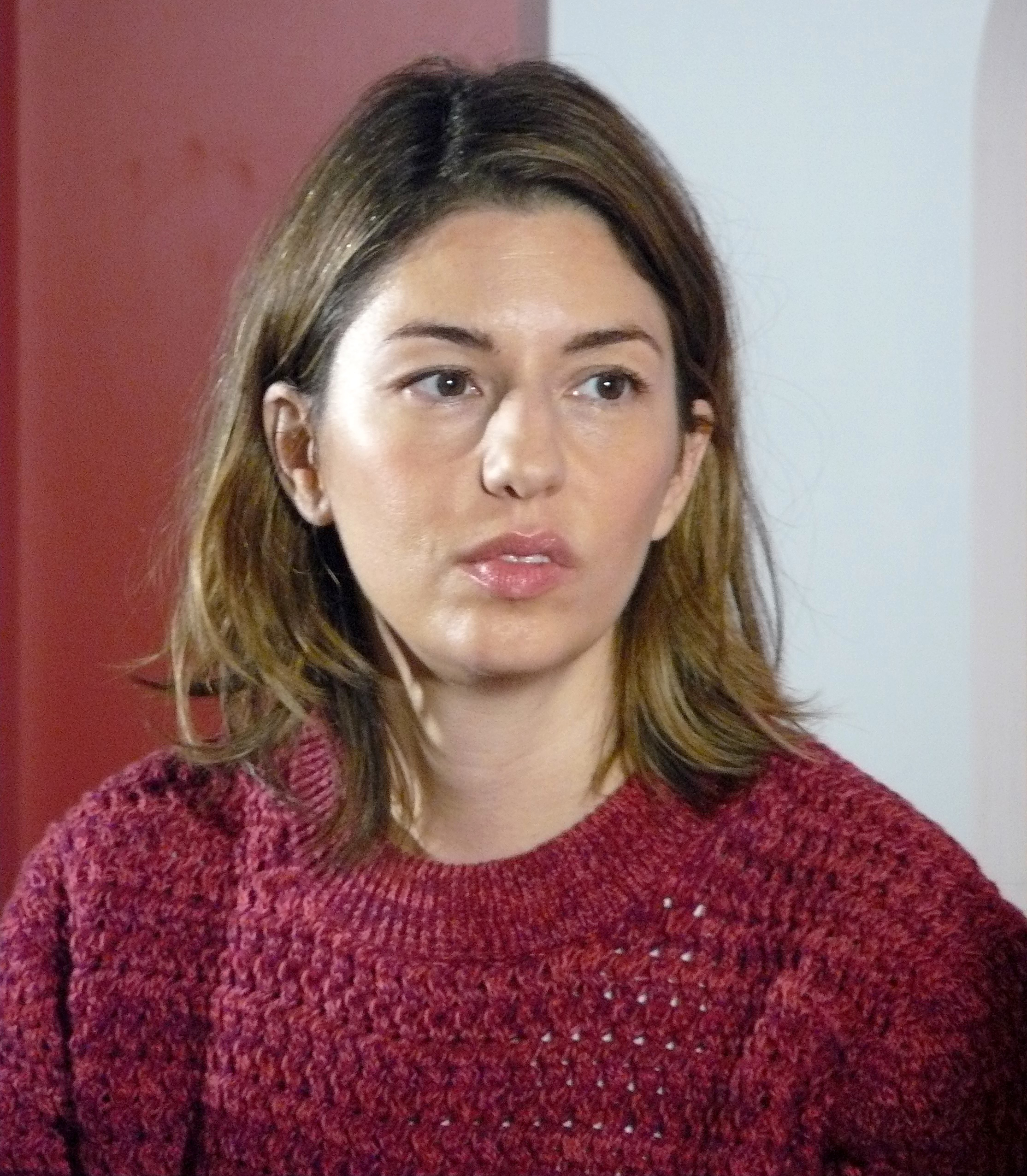 Sofia Coppola, le 7 novembre 2010 à la FNAC Montparnasse, lors d'une rencontre Masterclass à l'occasion de la sortie en janvier 2011 de son dernier film Somewhere.